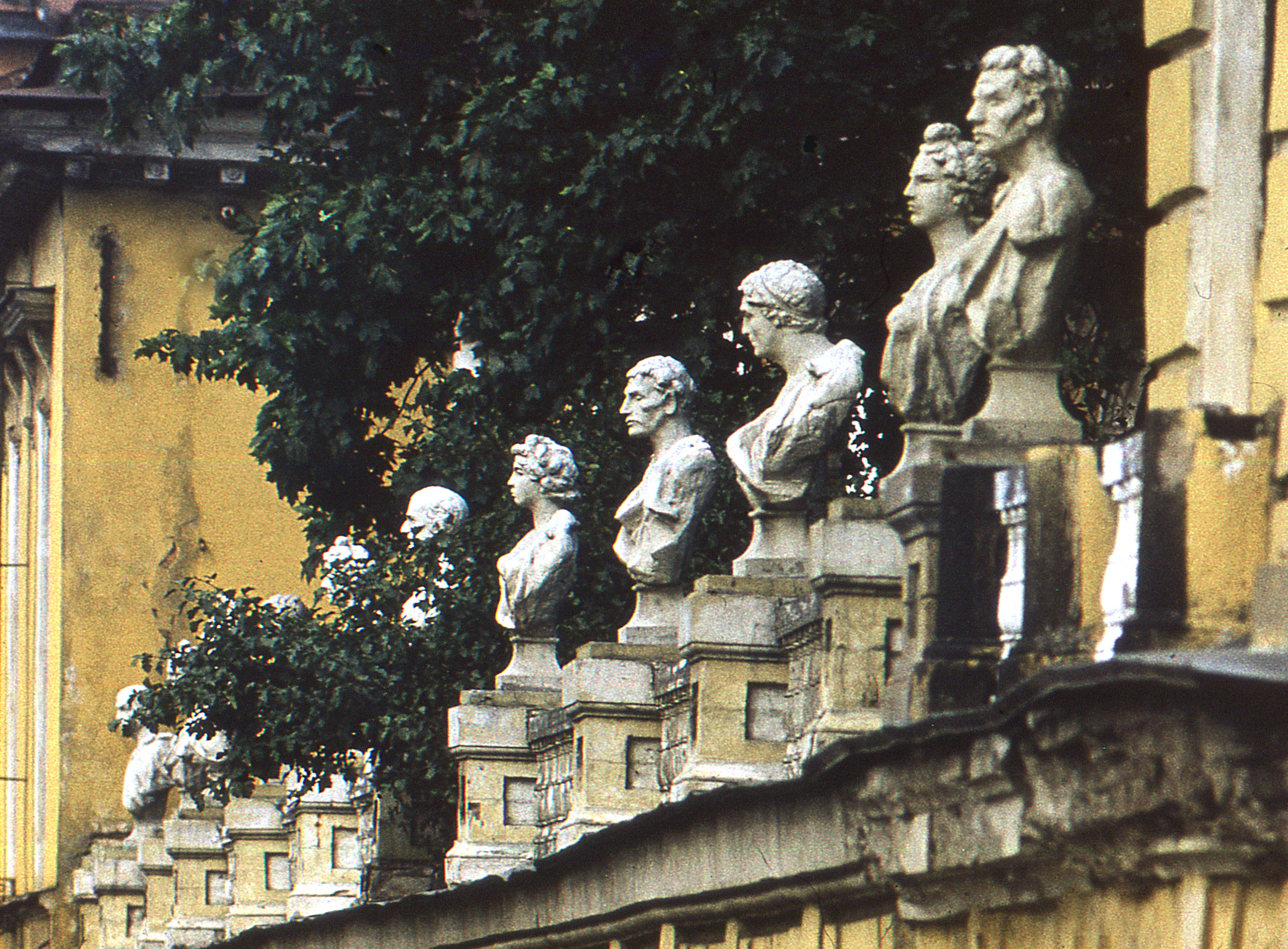 Ограда особняка Бобринских.Петербург. Ново-Адмиралтейский канал.